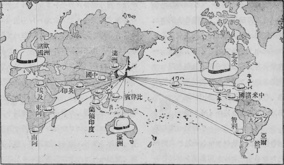 紙製パナマの輸出先 1935年